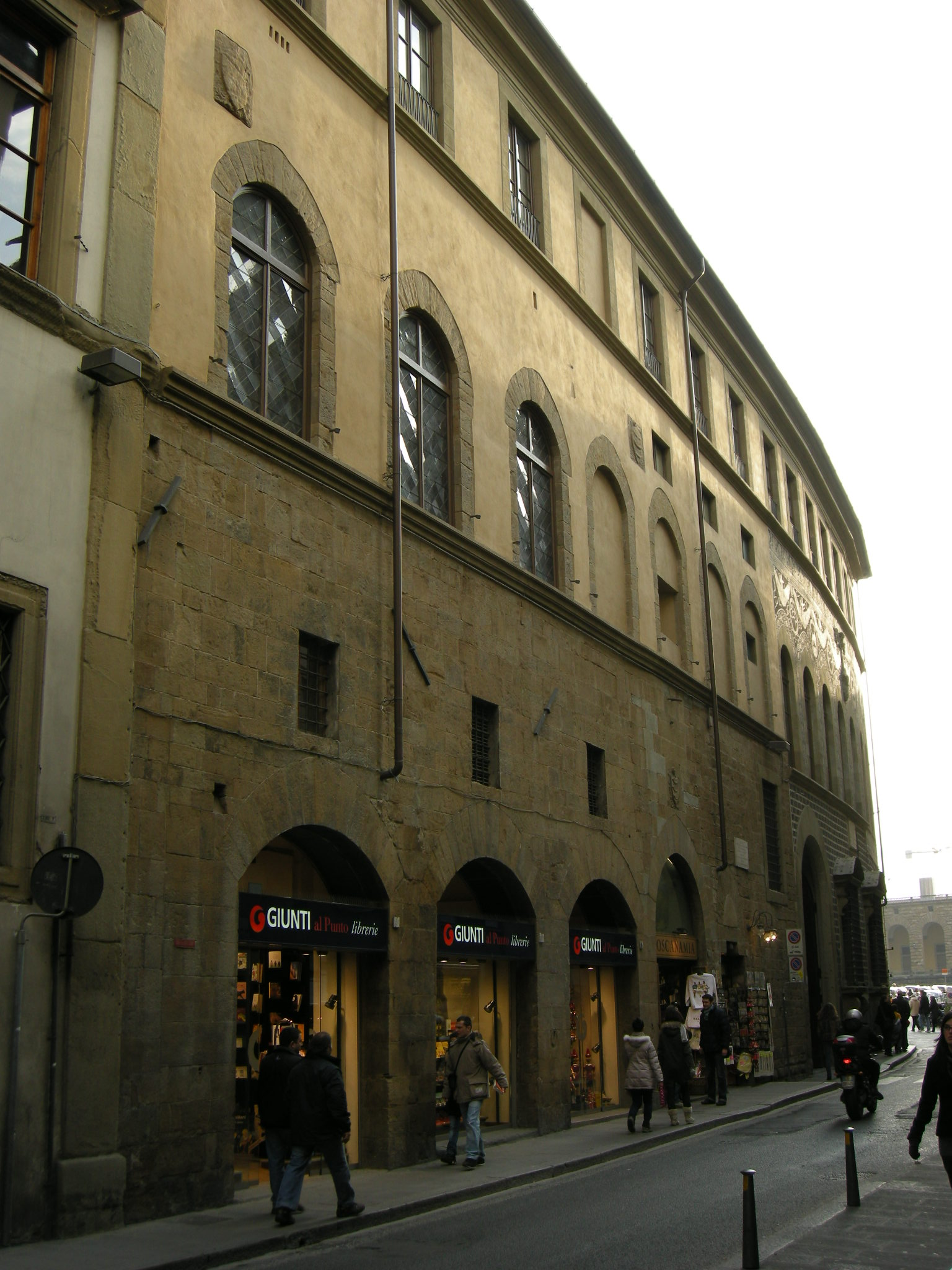 Palazzo guicciardini ext